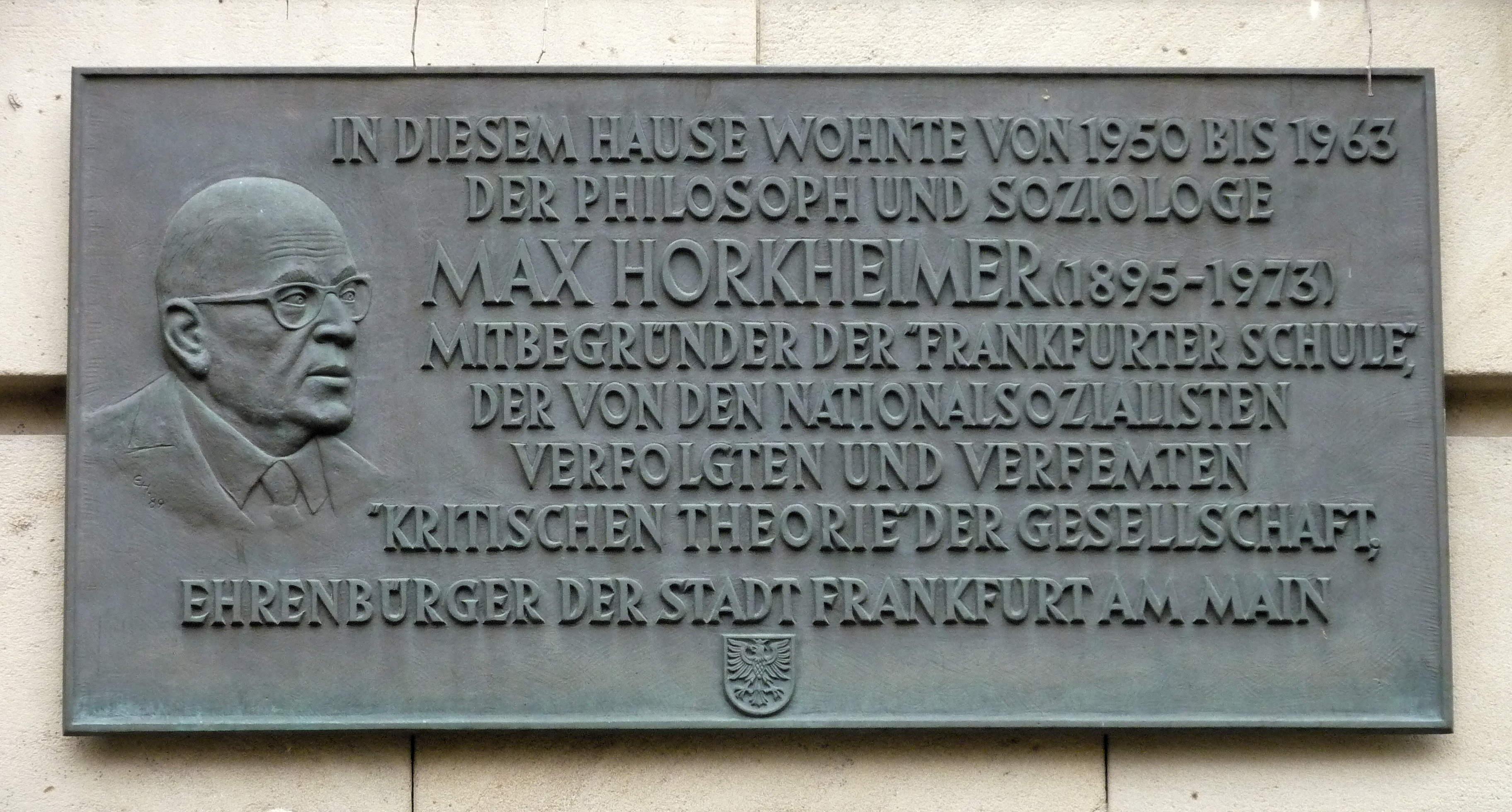 Gedenktafel für Max Horkheimer (1895–1973, Soziologe und Philosoph) an seinem Wohnhaus im Stadtteil Westend-Süd in Frankfurt am Main. Enthüllt am 14. Februar 1990. Bronzetafel mit Portrait, 100x50 cm, gestaltet von Edwin Hüller. Inschrift der Gedenktafel (Interpunktion hier teilweise ergänzt): „In diesem Hause wohnte von 1950 bis 1963 der Philosoph und Soziologe Max Horkheimer (1895-1973). Mitbegründer der Frankfurter Schule, der von den Nationalsozialisten verfolgten und verfemten „Kritischen Theorie“ der Gesellschaft. Ehrenbürger der Stadt Frankfurt am Main“